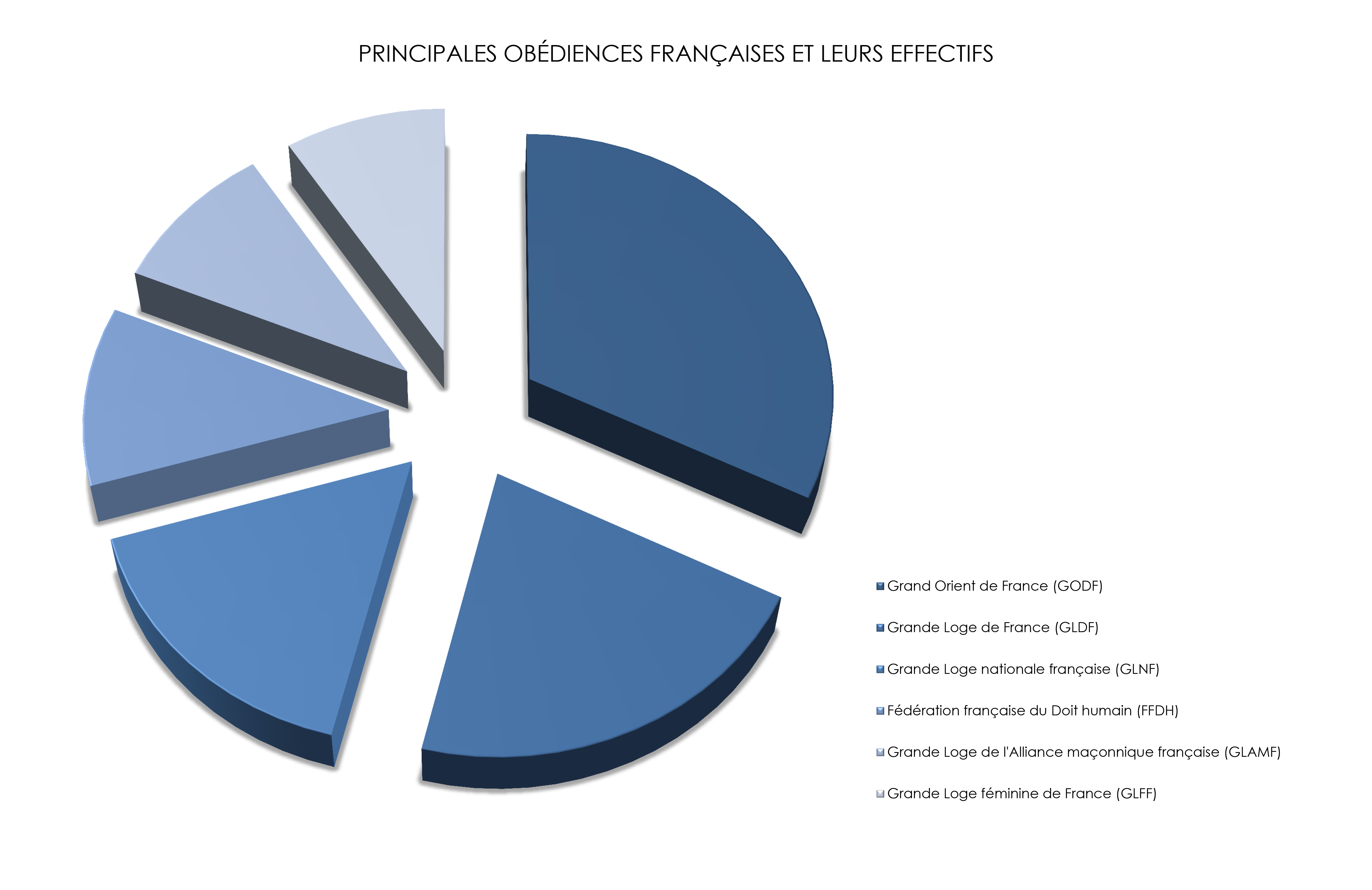 Pincipales obédiences françaises et leurs effectifs (fromage)